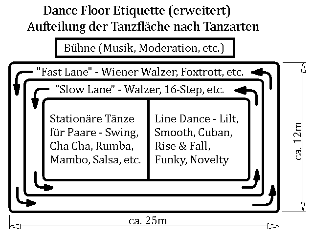 Dance Floor Aufteilung mit Line Dance